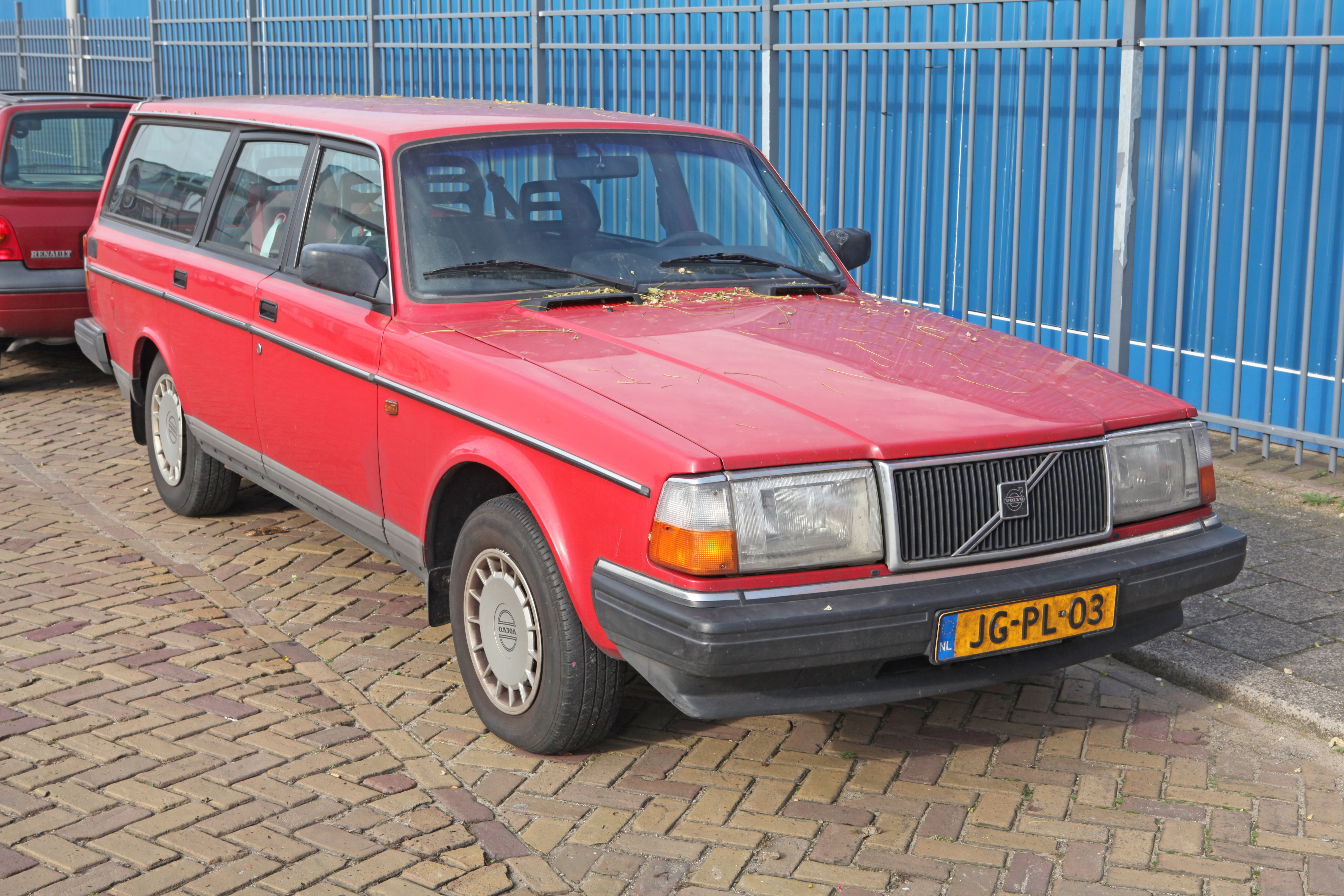 1993 Volvo 240 GL